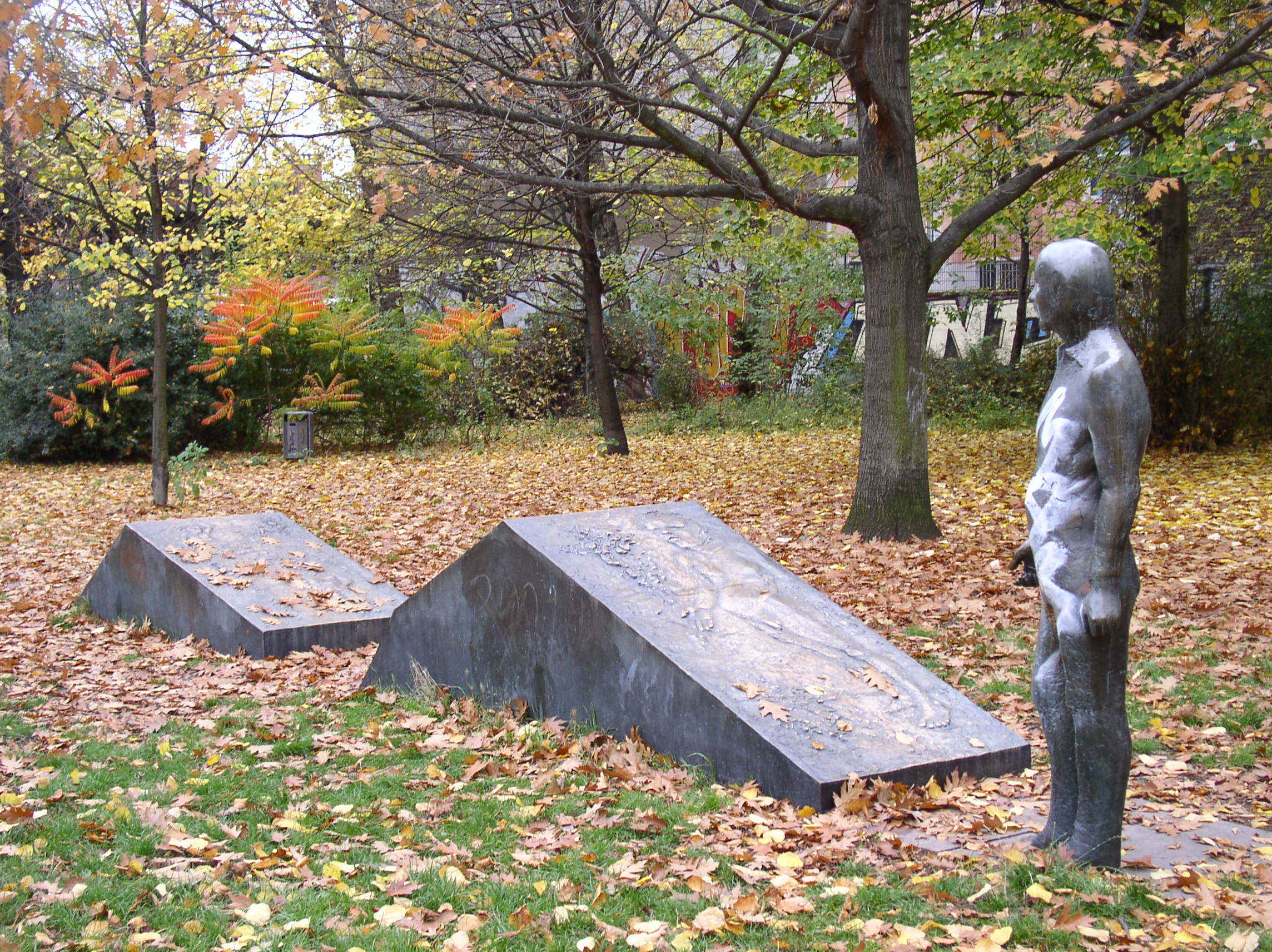 Stehende Figur vor Reliefkörpern, Teil der Menschenlandschaft Berlin, fotografiert von Benutzer:Necrophorus; GNU FDL